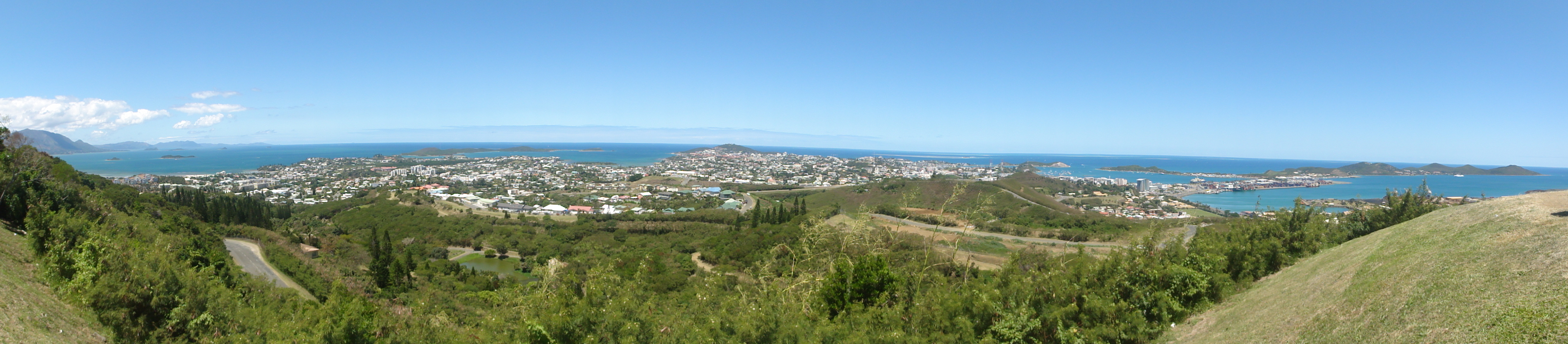 Panoramique de Nouméa depuis Montravel